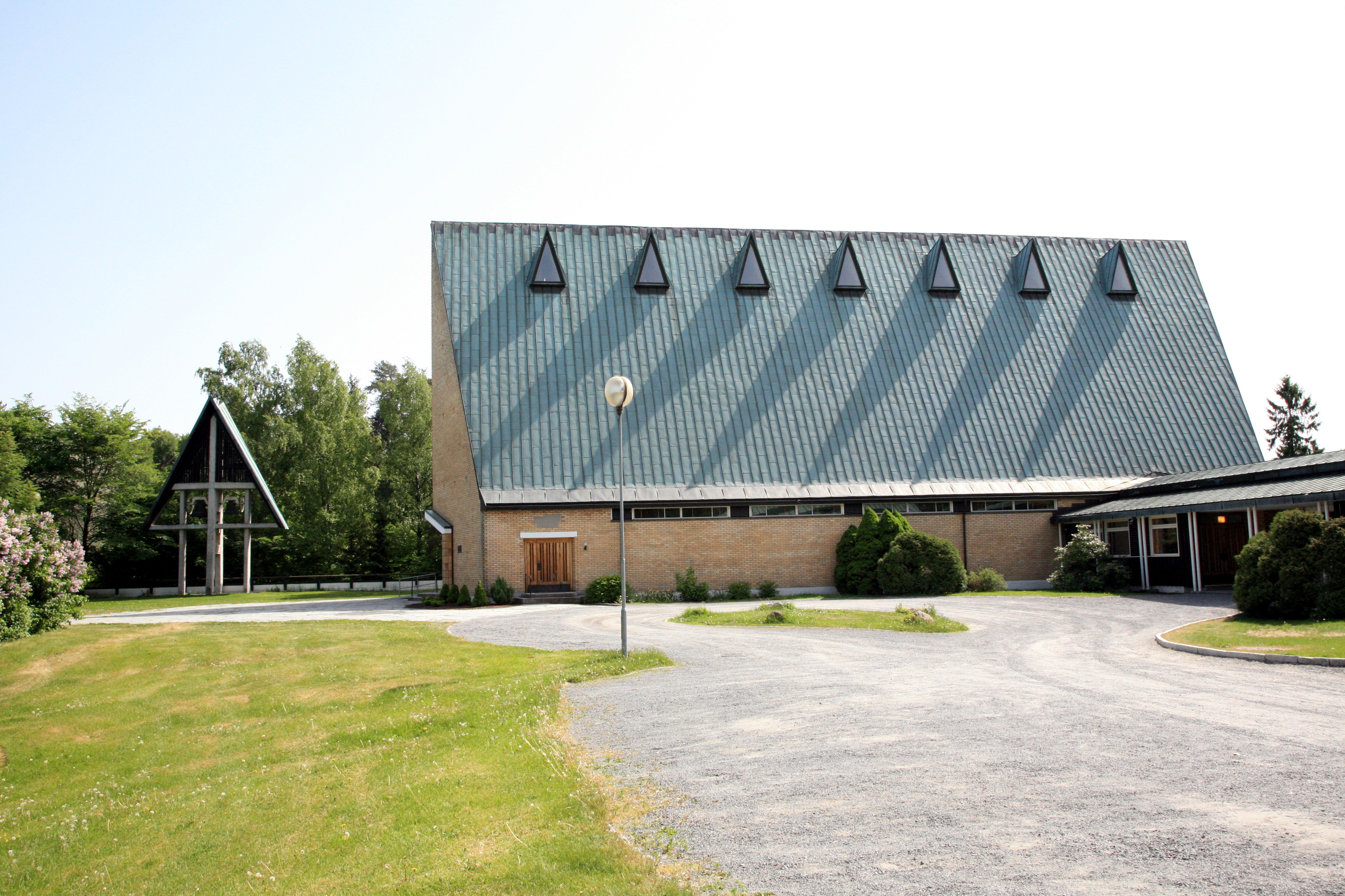 Jar church in Bærum, Norway